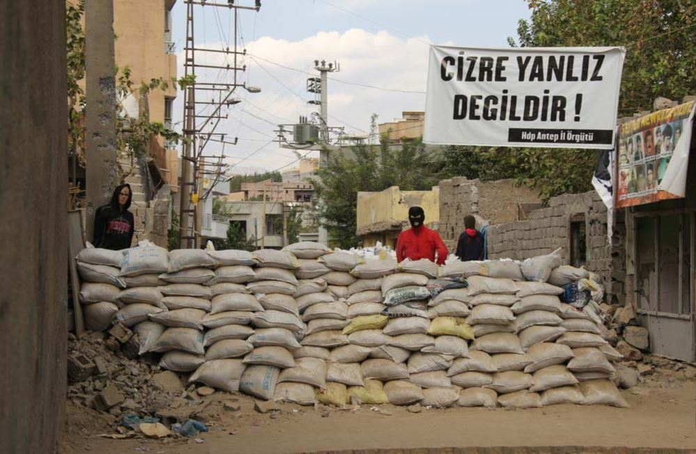 Yurtsever Devrimci Gençlik Hareketi (YDG-H) üyeleri özyönetim talebi nedeniyle gerçekleşen 2015 Şırnak ayaklanması'nda açılan barikatların arkasında